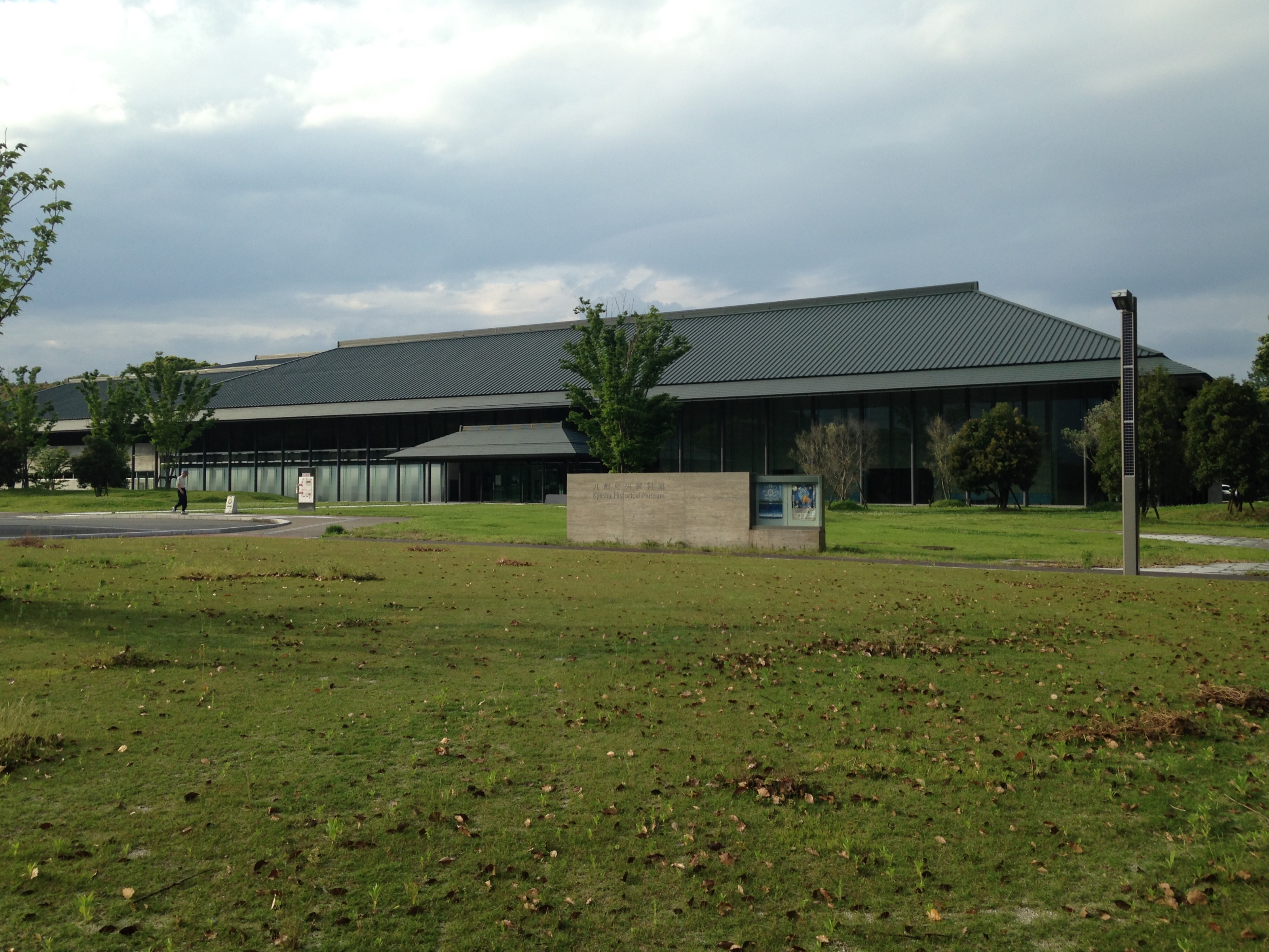 九州歴史資料館